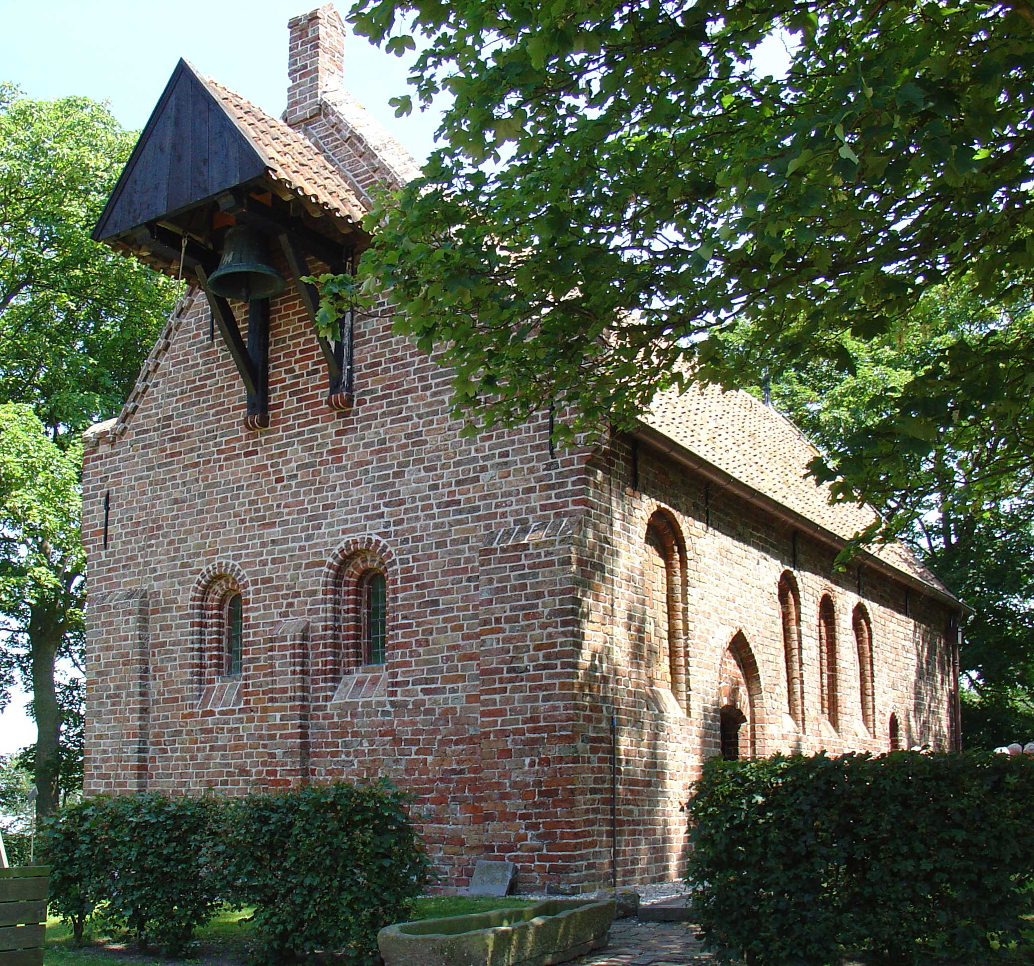 Tsjerke fan Jannum